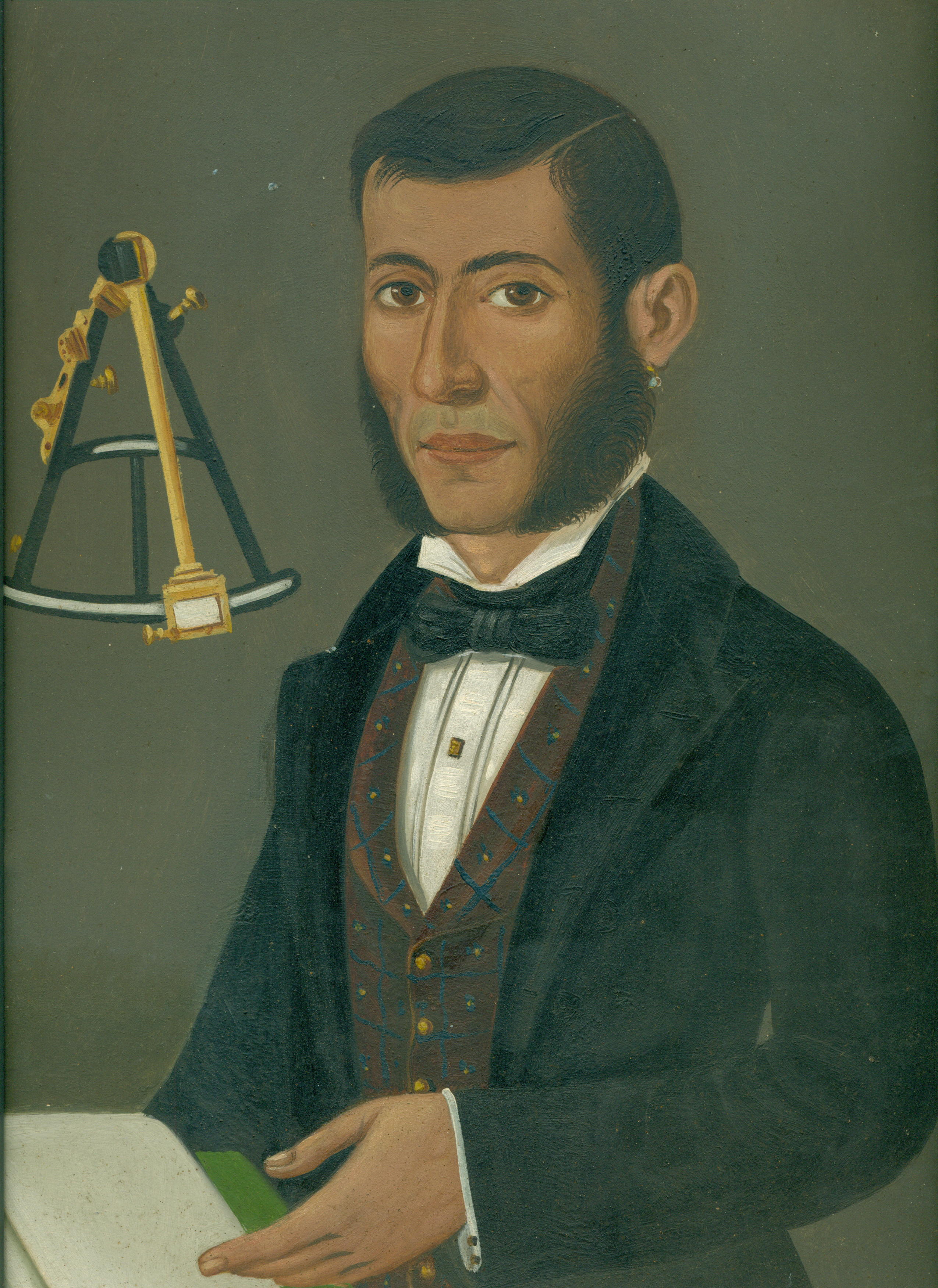 Tommaso Giardino in un ritratto di famiglia